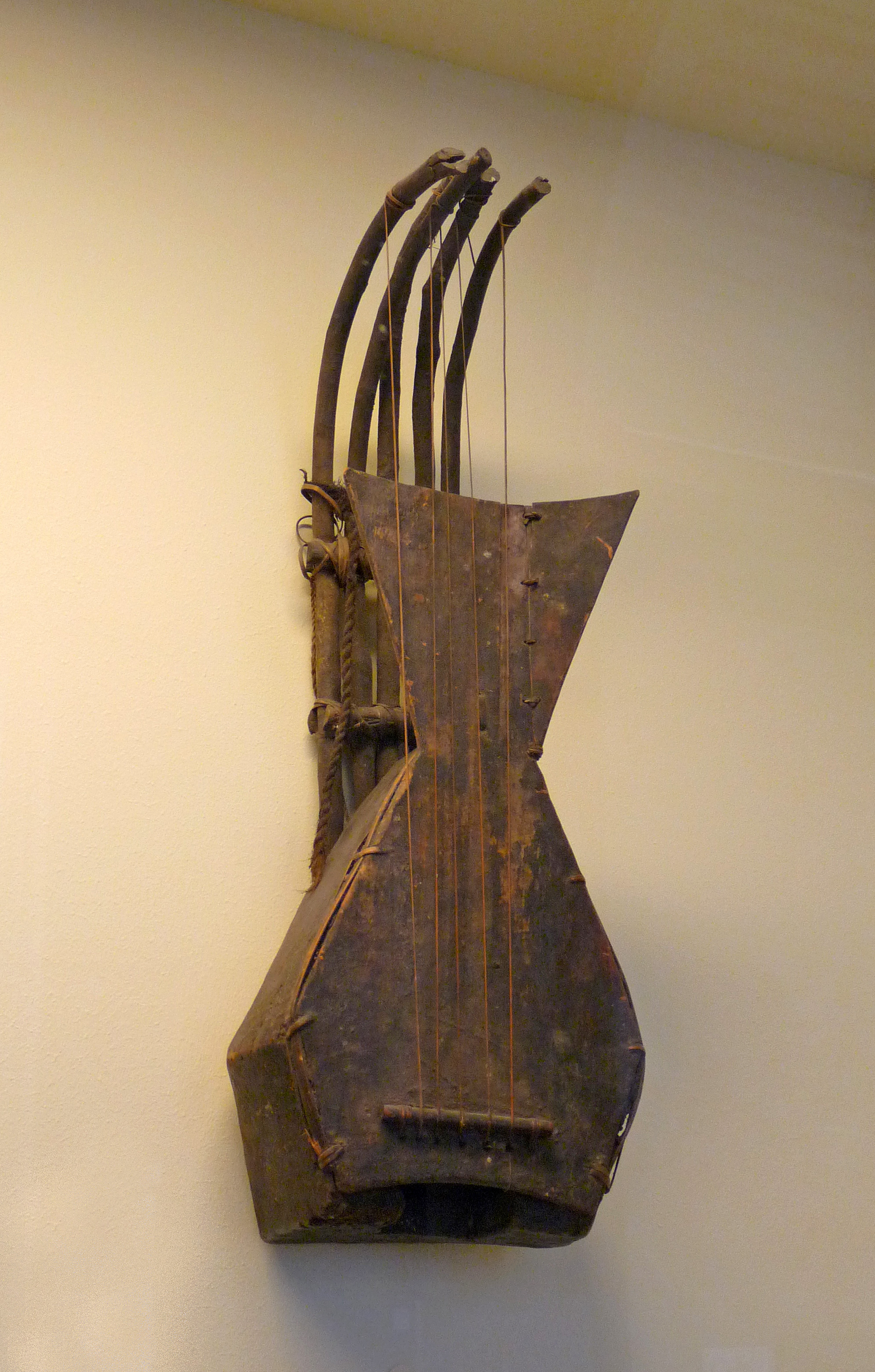 Teke (Zaïre) : pluriarc. Musée royal de l'Afrique centrale